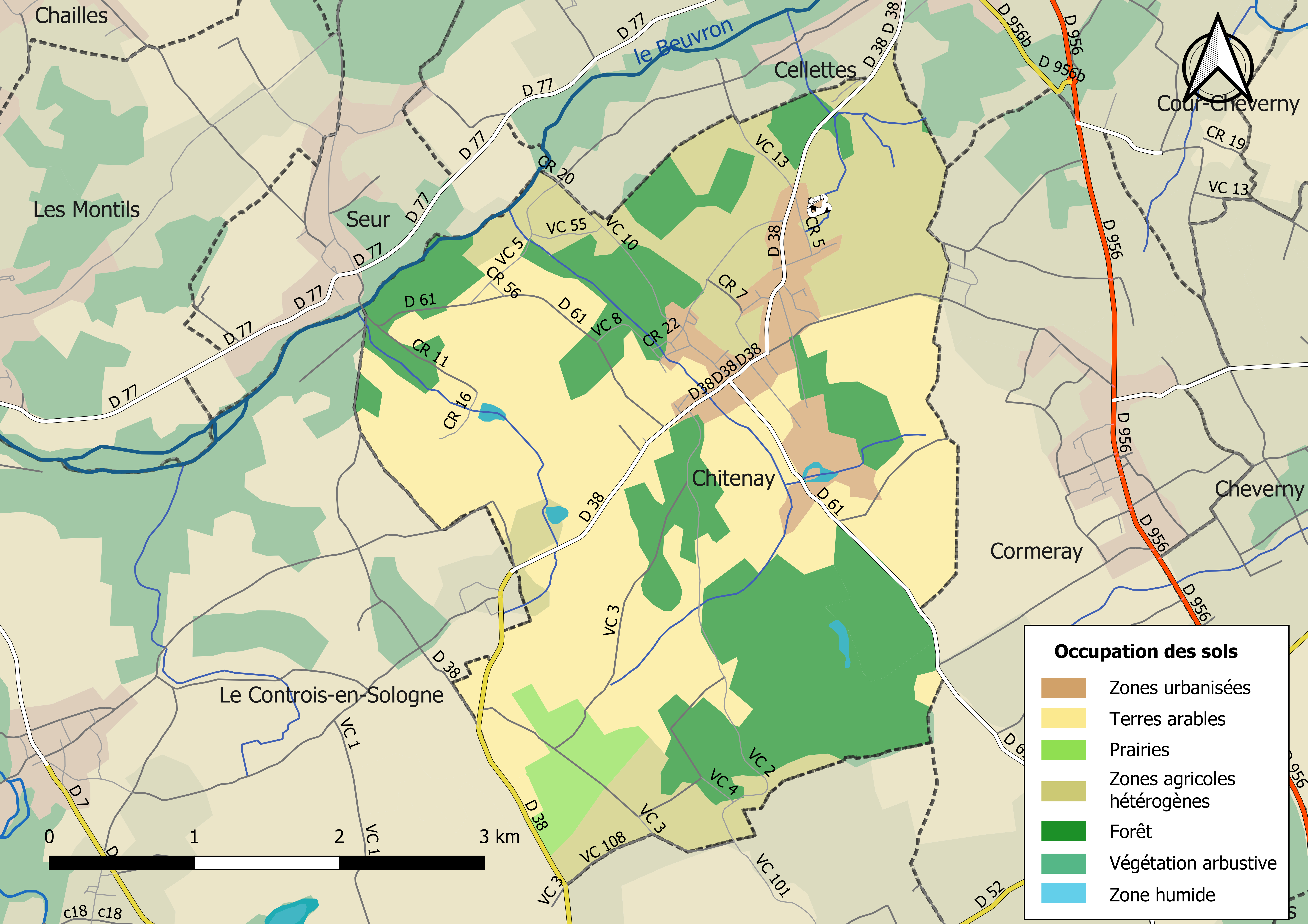 Carte des infrastructures et de l’occupation des sols en 2018 de la commune de Chitenay (France).